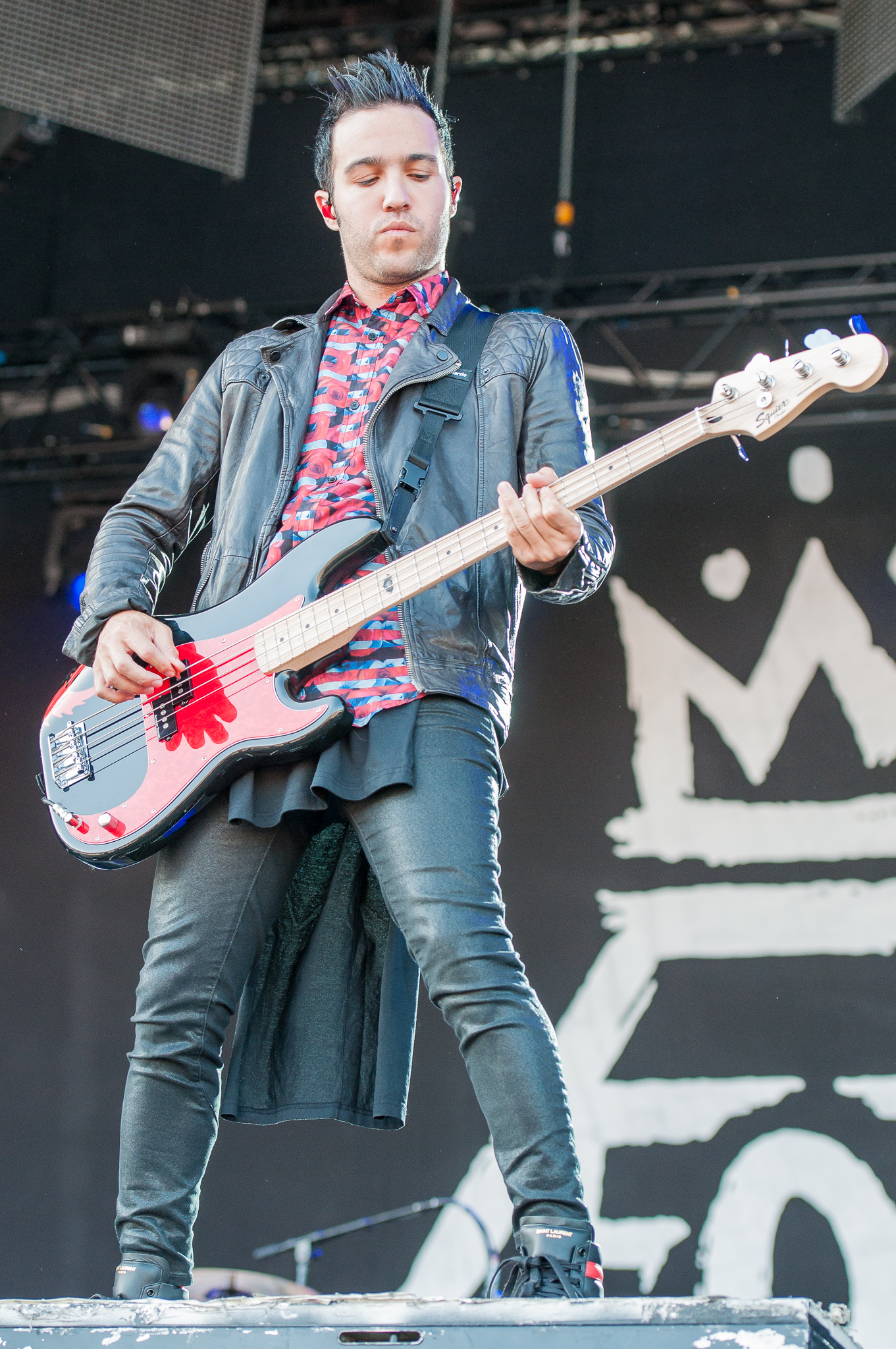 ARGO-Konzerte,Centerstage,Fall Out Boy,Konzert,Livekonzert,Livemusik,Musik,Pete Wentz,RiP,Rock im Park 2014